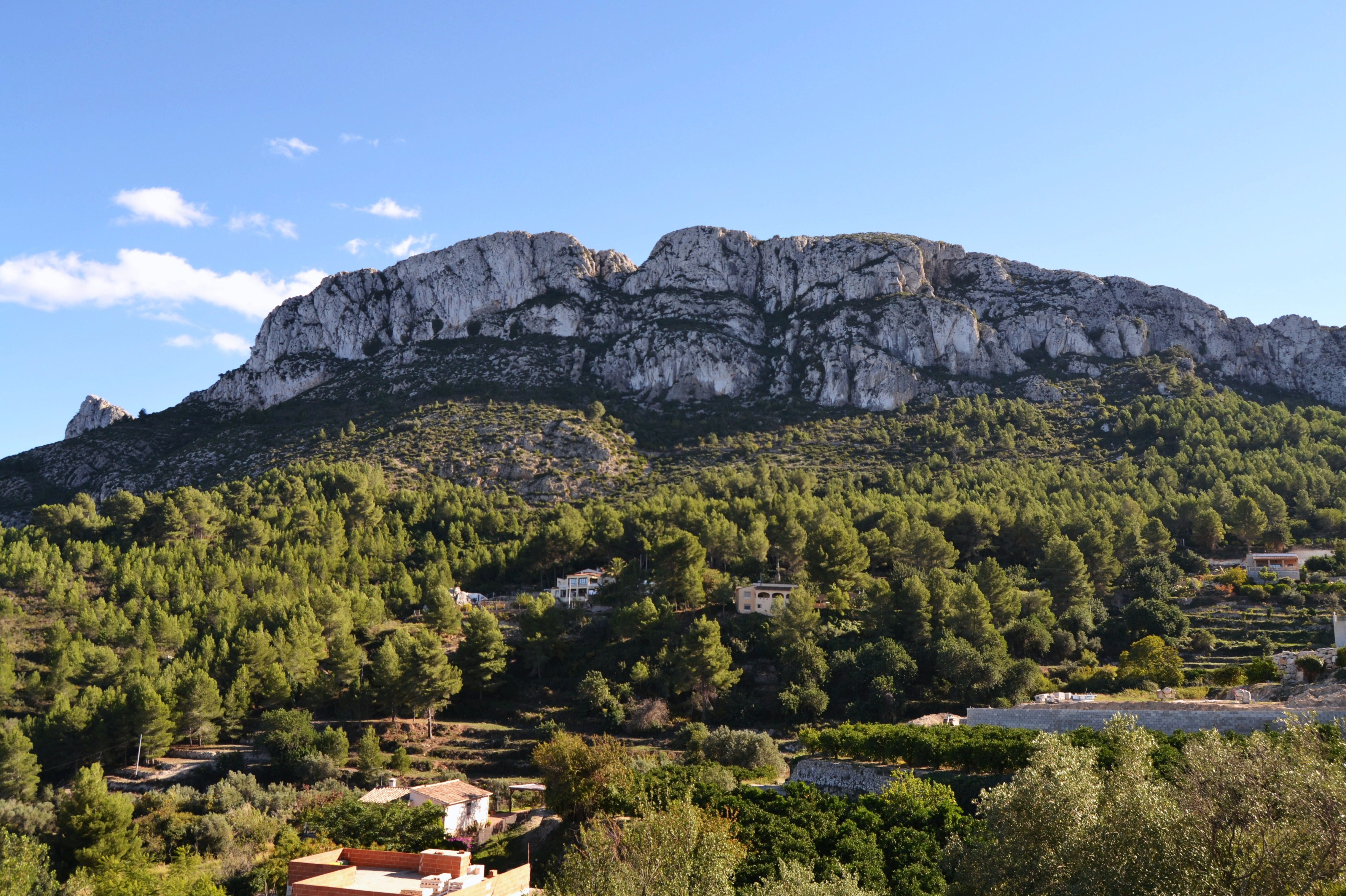 Serra de Segària, cara de l'ombria.